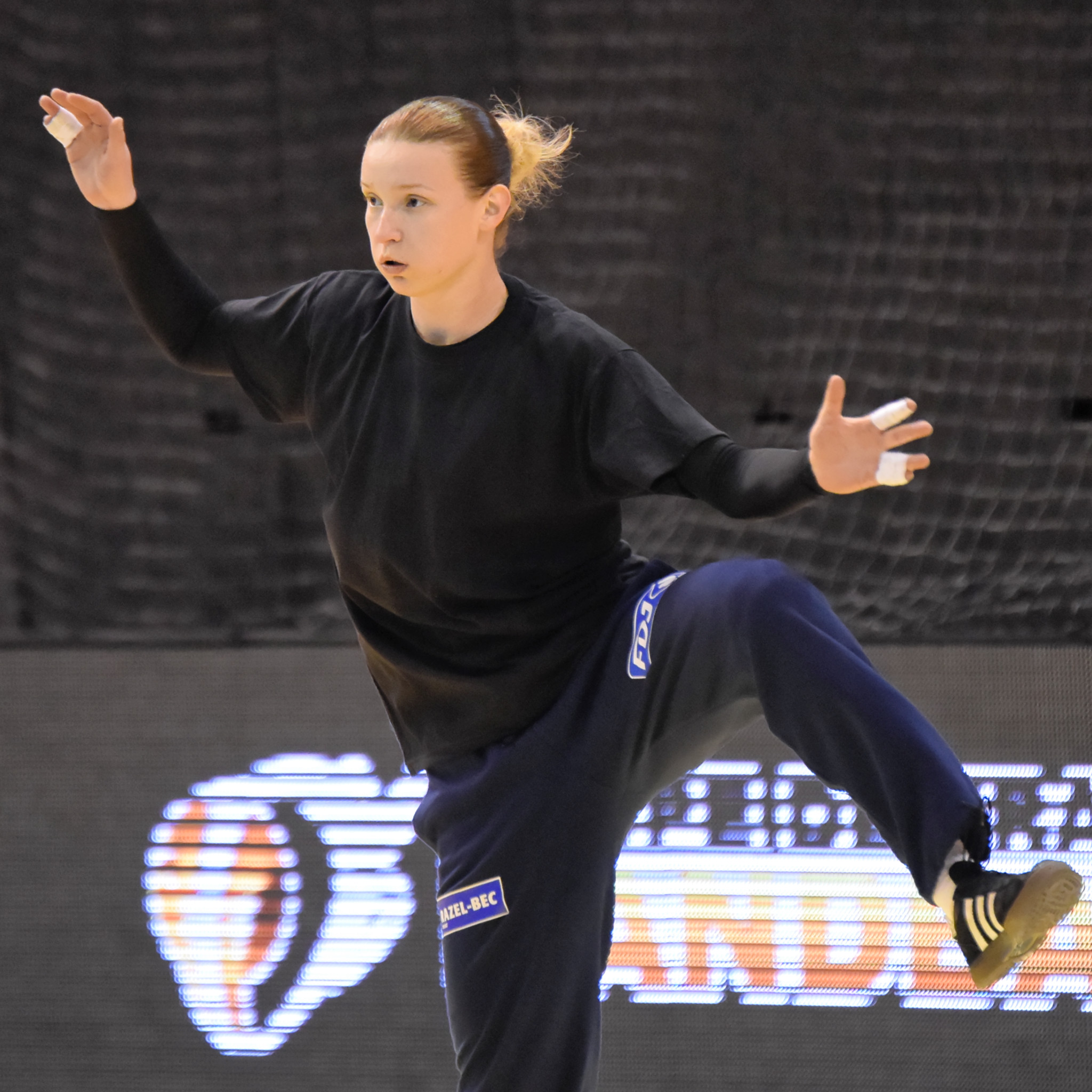 Rencontre entre la France et le Danemark lors de la Golden League 2015. A Dijon, le 19 mars 2015.